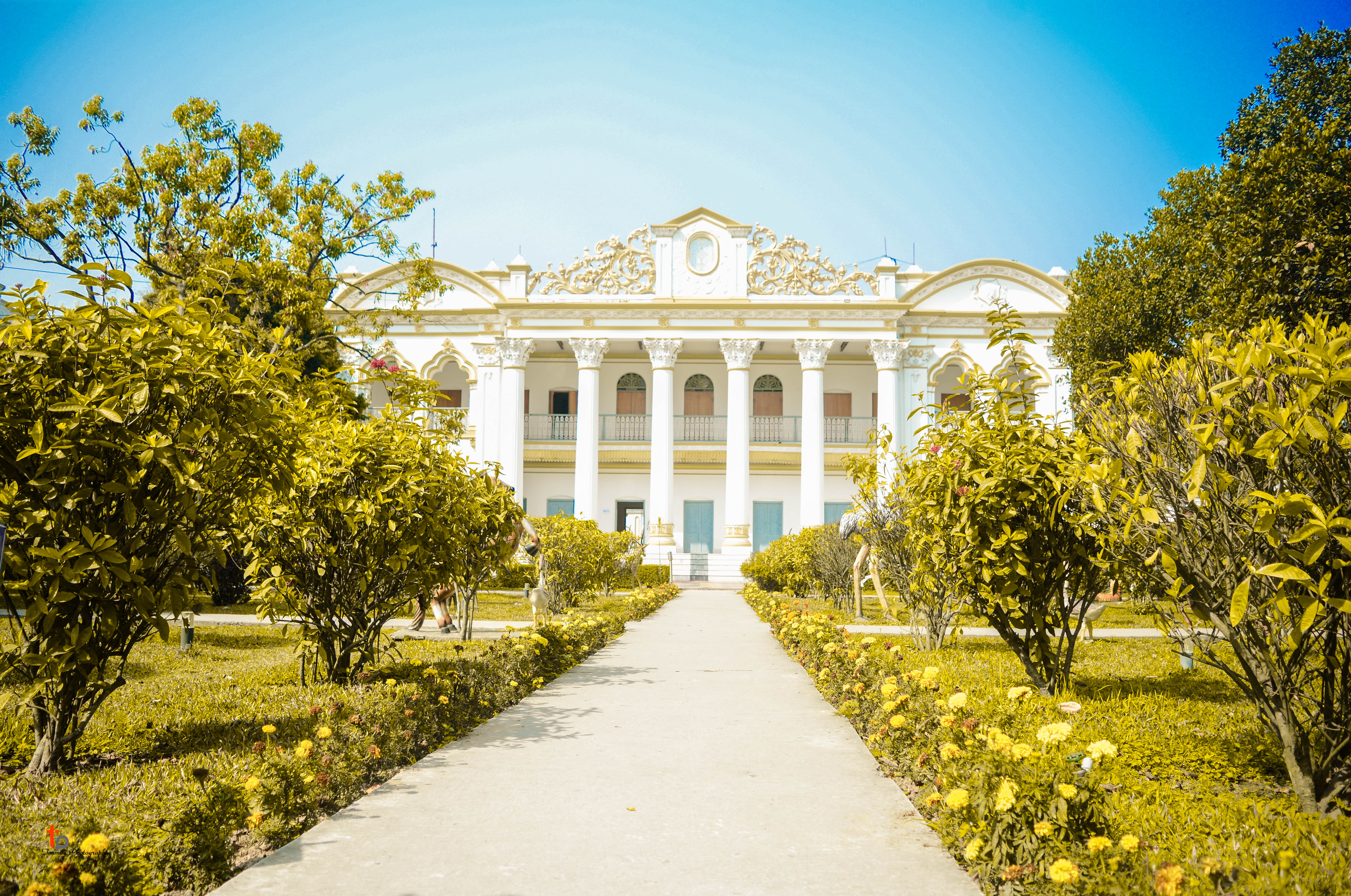 মহেরা জমিদার বাড়ি